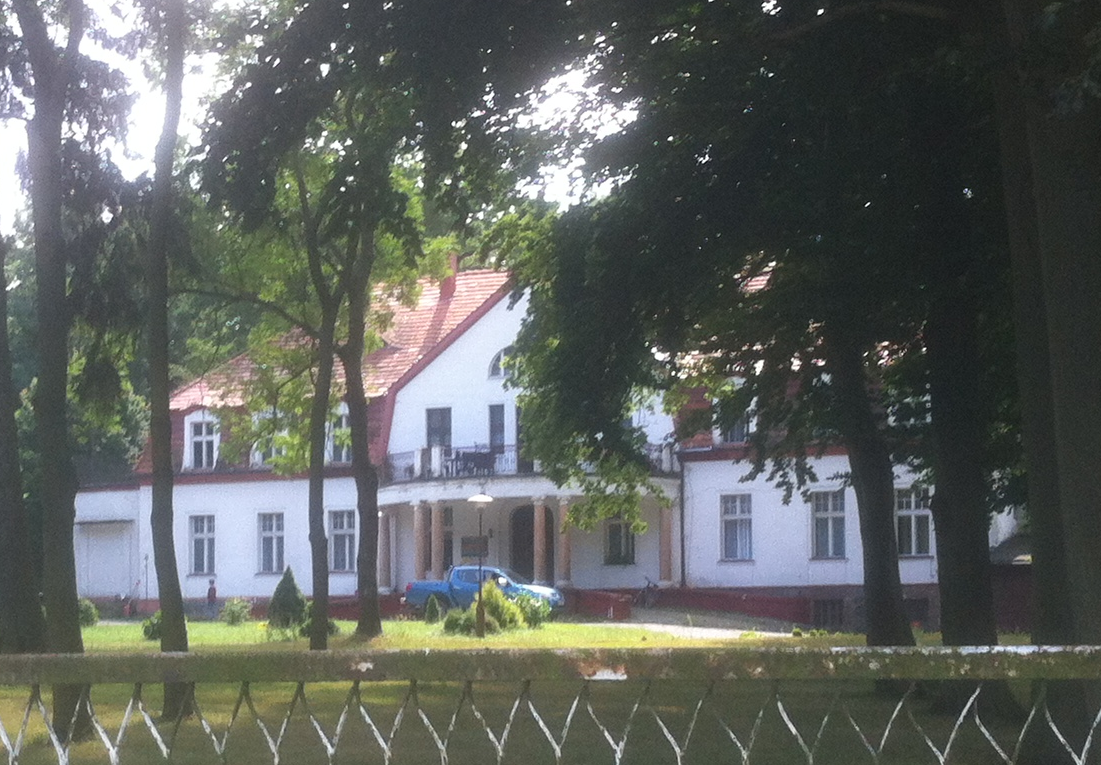 Eigenes Foto